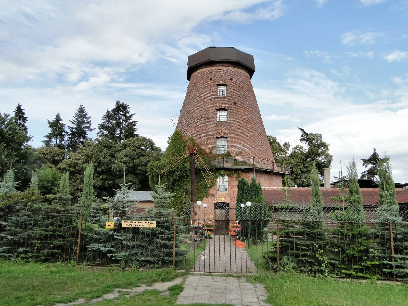 Zabytkowy wiatrak przy ul. Mieszka I w Szczecinie (teren Cmentarza Centralnego)